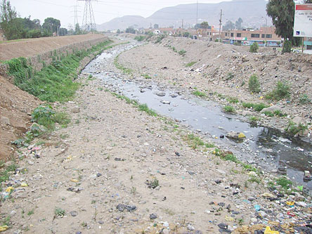 Está ubicado en la parte norte de la ciudad de Lima